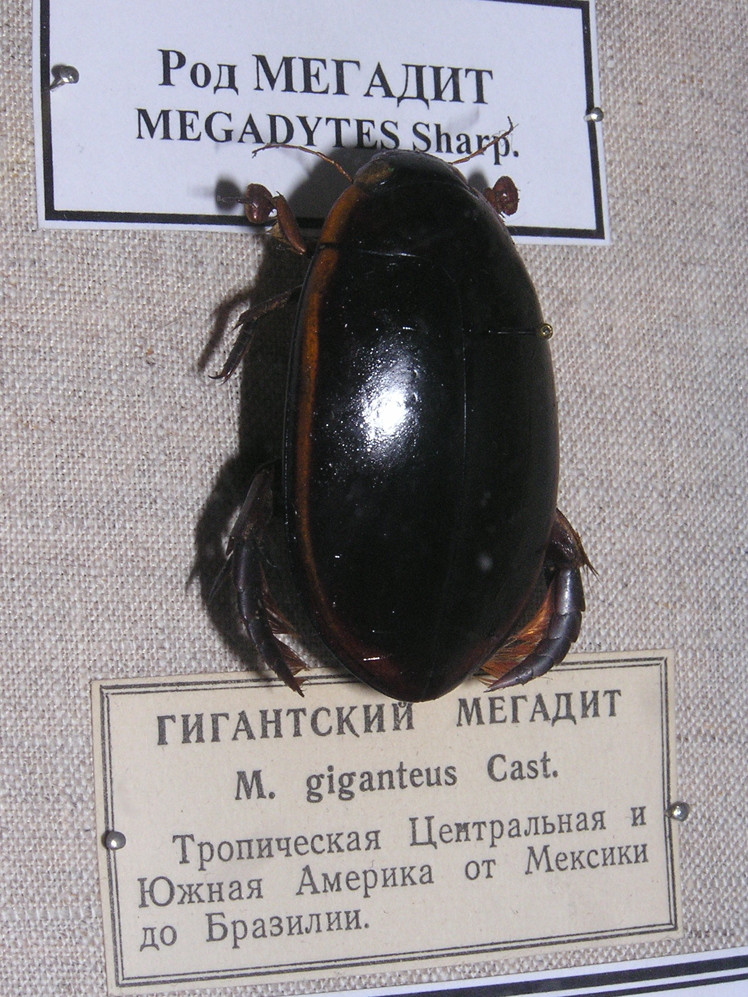 Megadytes giganteus